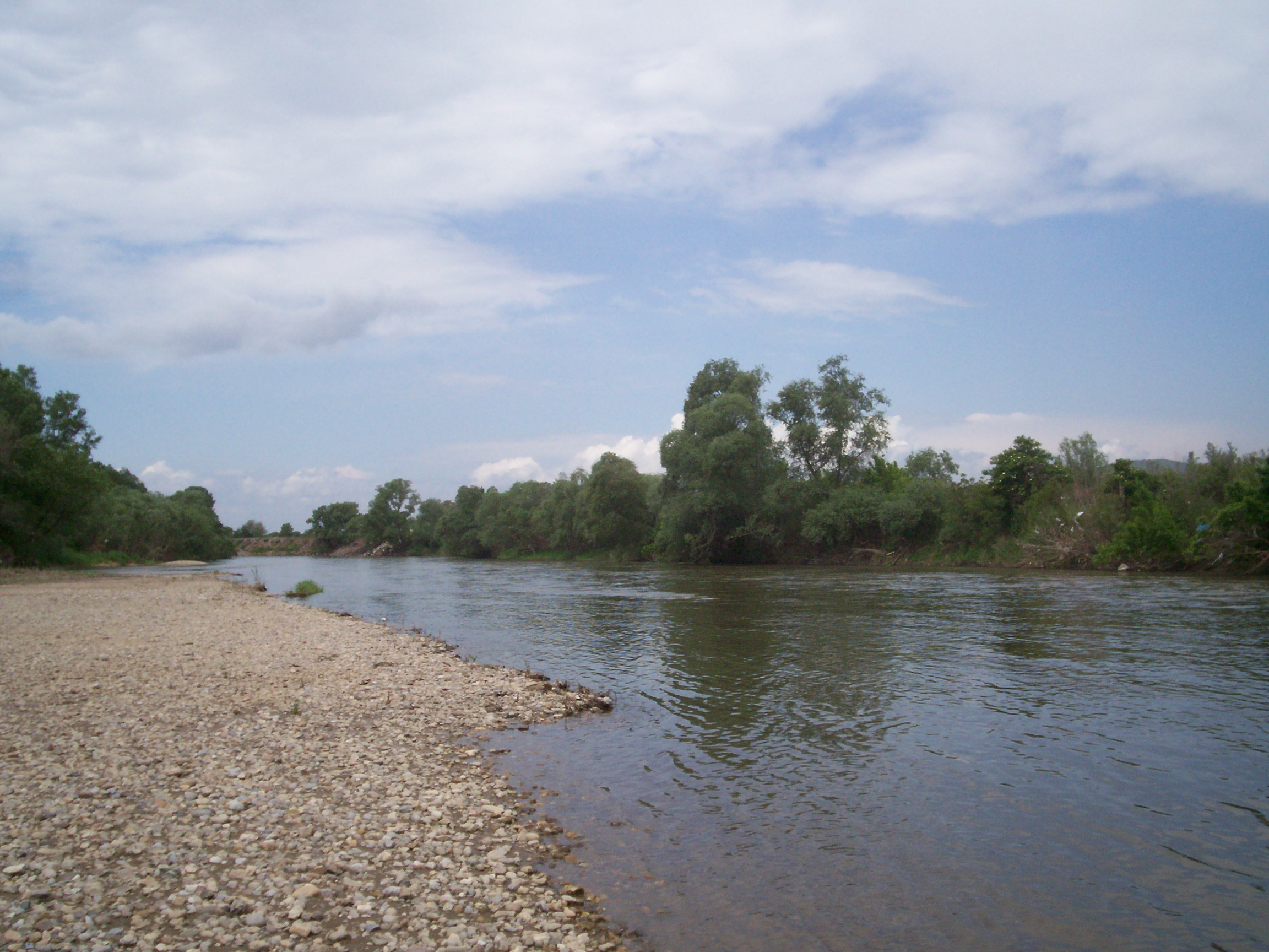 Řeka Jižní Morava (Jужна Морава) v Srbsku